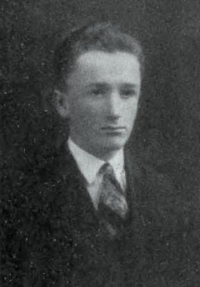 Adam Fastnacht w młodym wieku